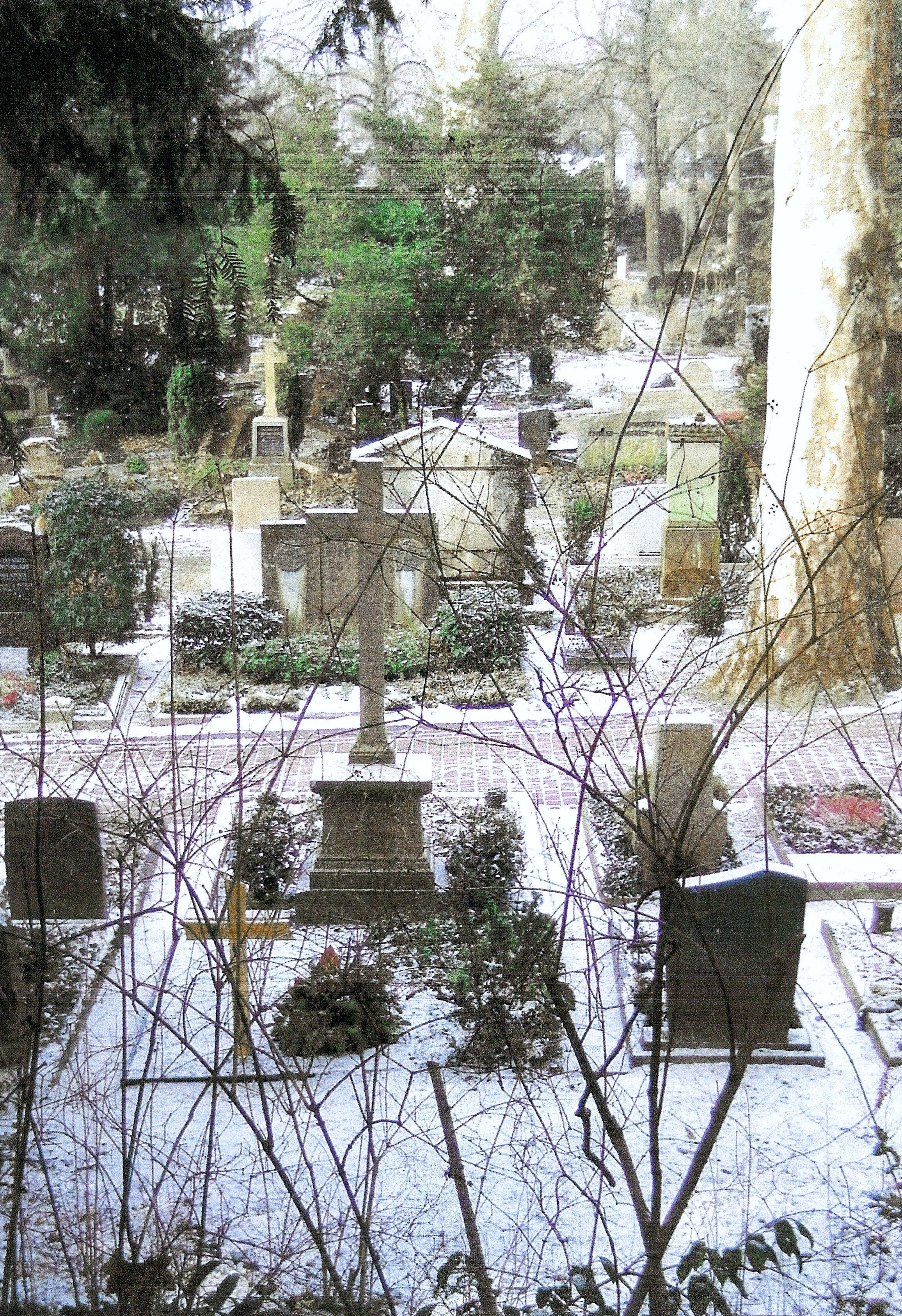 Heidelberger Bergfriedhof mit Grabkreuz der Familie Fritz, Julie und Dr. Wilhelm Moufang